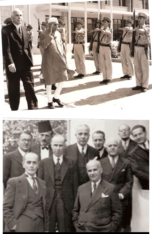 Nehru et le gouvernement de 41